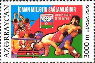 Markanın üzərində boks, güləş və voleybol oyunu təsvir olunmuşdur. Marka "İdman millətin sağlamlığıdır" mövzusuna həsr olunmuşdur.